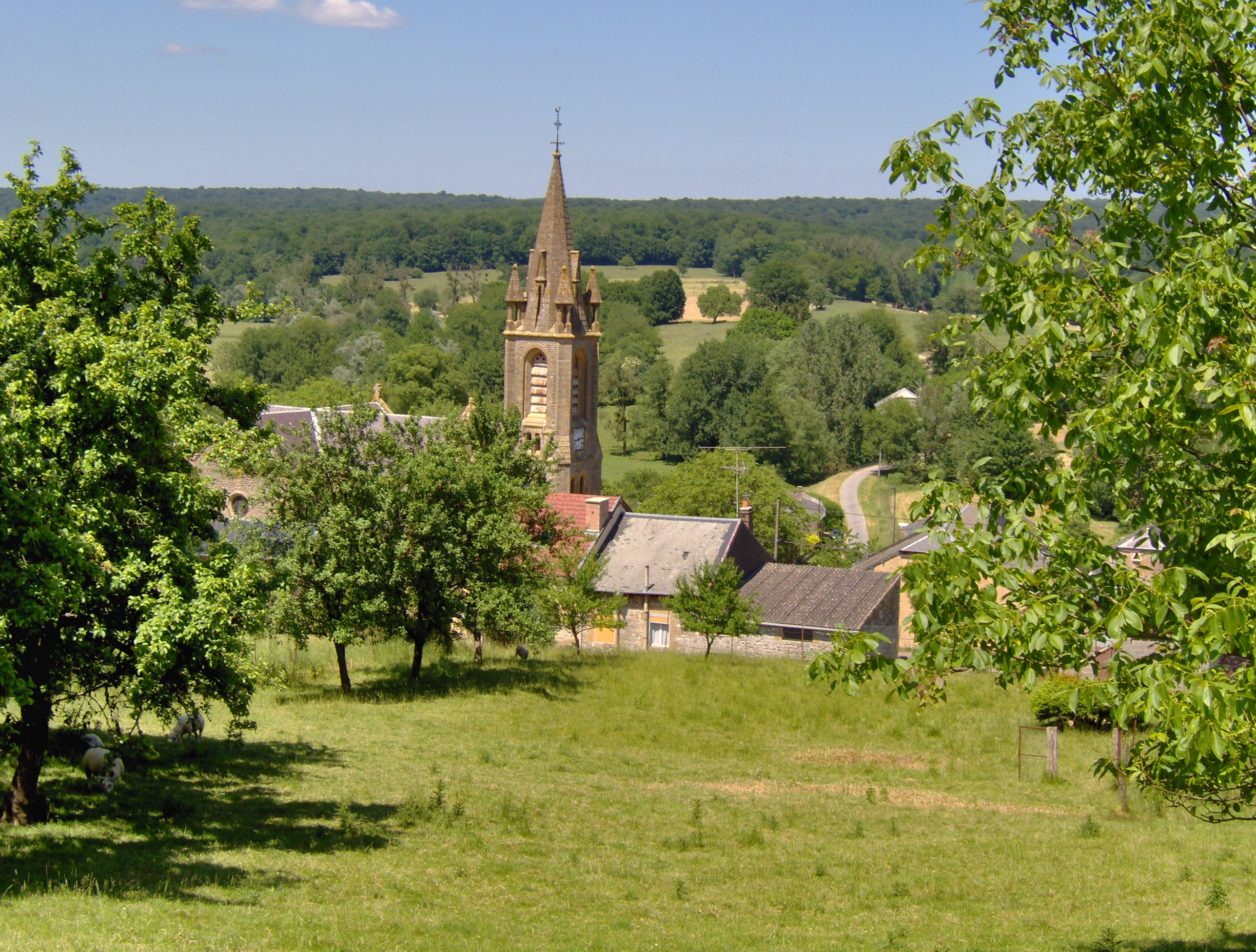 Vue générale de la commune de Louvergny (Ardennes, France).